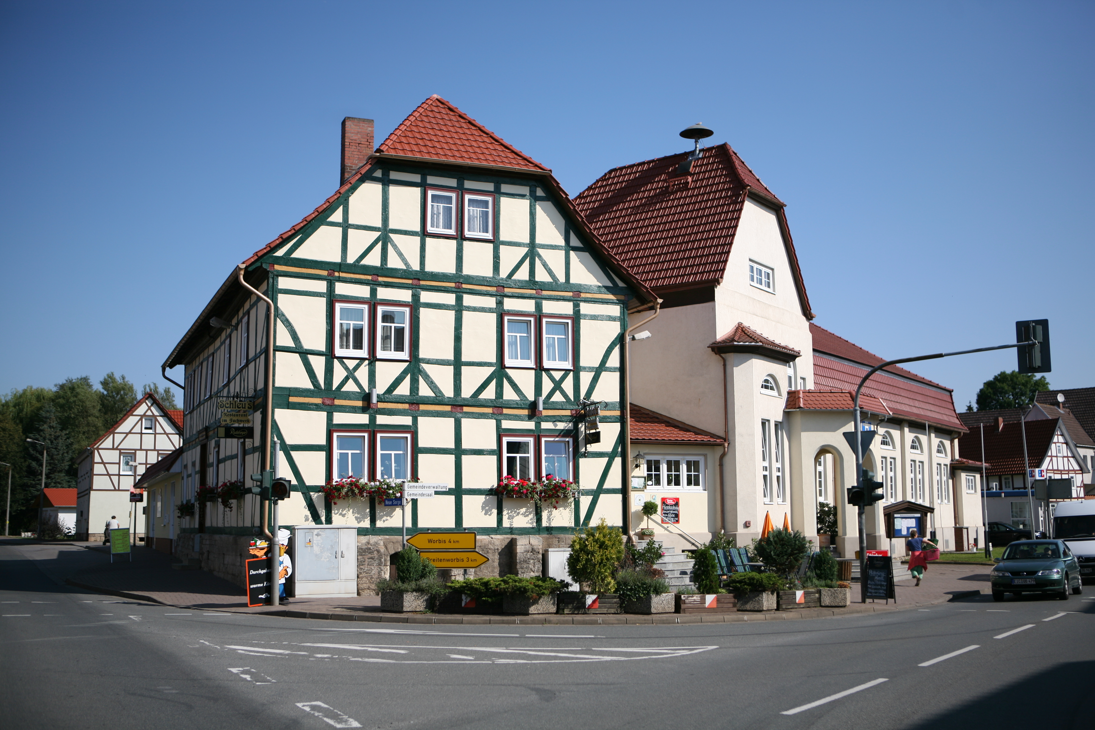 Fachwerkhaus mit Restaurant in Gernrode (Eichsfeld)